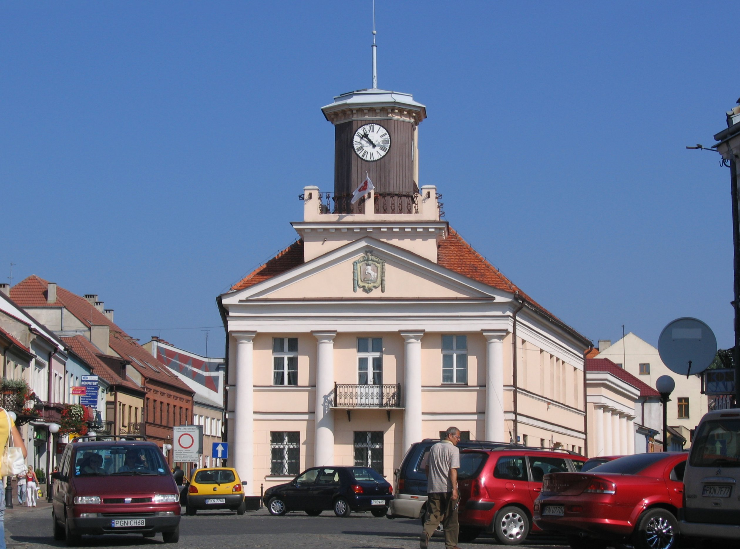 Ratusz w Starym Koninie